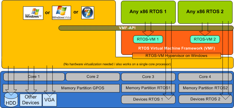 RTOSWin